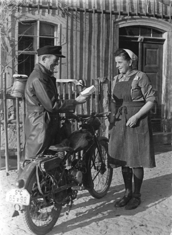 Ochsensaal, Planerfasser der VEAB, Selbstverpflichtung ZB-Illner-16.12.1953 Ein Vorbild für viele Dörfer - die Gemeinde Ochsensaal. In der Ablieferung landwirtschaftlicher Erzeugnisse ist als vorbildlich bekannt die Gemeinde Ochsensaal im Kreise Oschats. Für die gewissenhafte Erfüllung der Ablieferungspflicht in den 27 landwirtschaftlichen Betrieben der Gemeinde sorgt ein Erfassungsaktiv, dem die tüchtigsten Bauern als Vertreter der VdgB (BHG) angehören. Das Aktiv hat die gegenseitige Hilfe der Bauern untereinander so vorbildlich organisiert, daß sie sich die Arbeit eines staatlichen Erfassers in der Gemeinde erübrigt. Offene und sachliche Aussprachen über politische Probleme und über ihre Arbeit im Dorf fürhen die Bauern in den 7 Hofgemeinschaften der Gemeinde, die mehrmals im Monat zusammenkommen. UBz: Freudig übergibt die Bäuerin Sophie Sömisch dem Erfasser der VEAB Kurt Lehmann einen Zettel mit der Selbstverpflichtung ihres Mannes, in der es heißt: "Zu Ehren des 4. Deutschen Bauerntages verpflichtet sich der Bauer Kurt Sömsch, das gesamte Fleischsoll für 1954 und darüber hinaus 6 Schweine dem freien Aufkauf bis Ende Februar zu liefern".